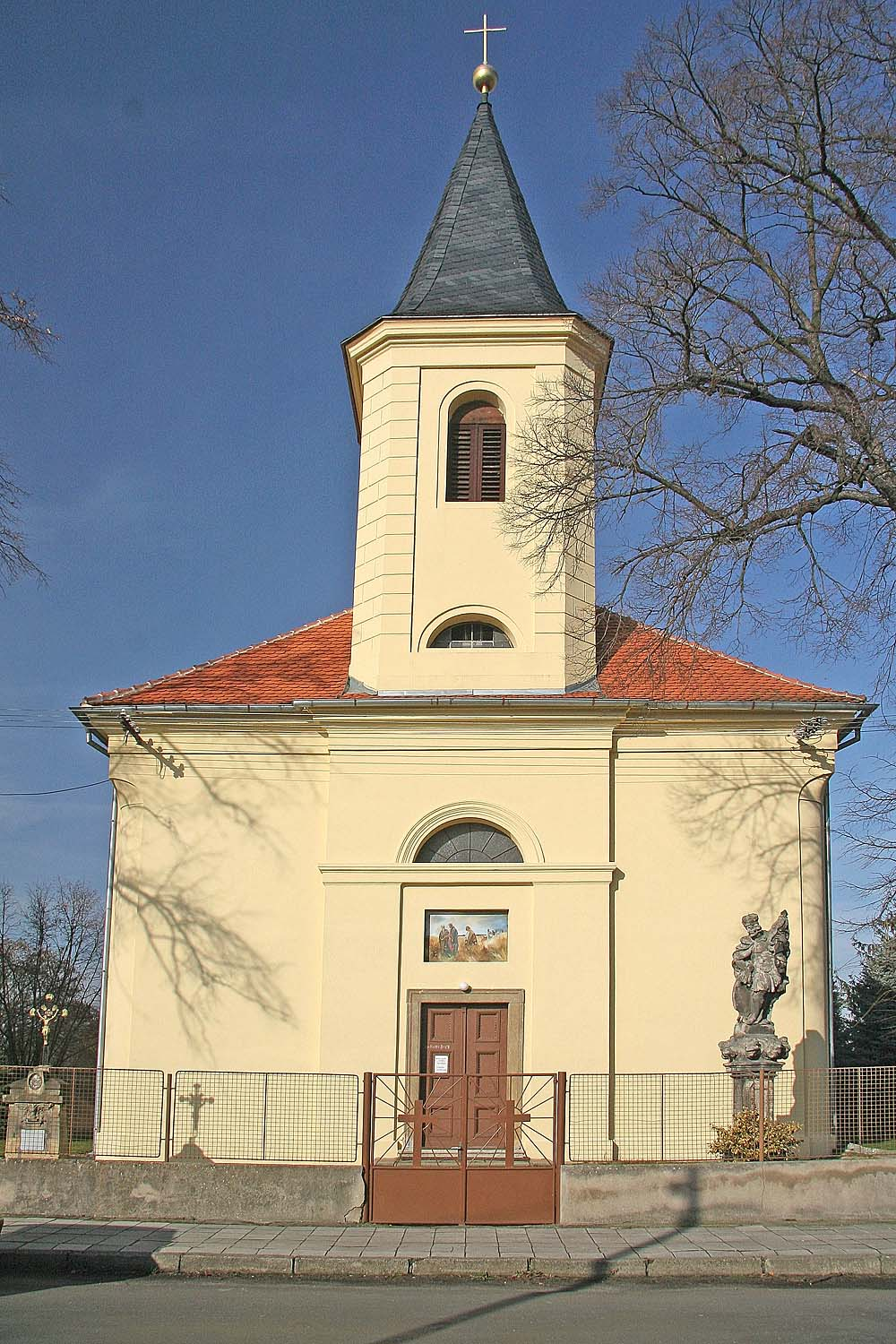 Veltruby - Kostel Nanebevzetí Panny Marie, district Kolín autor: Prazak date: 5. 2. 2007